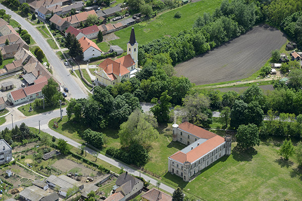 Egyed község légi felvételen